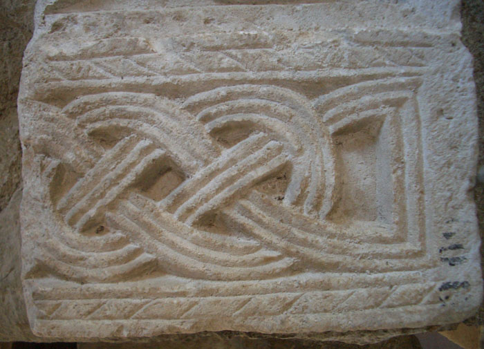 Spaetantikes Flechtband